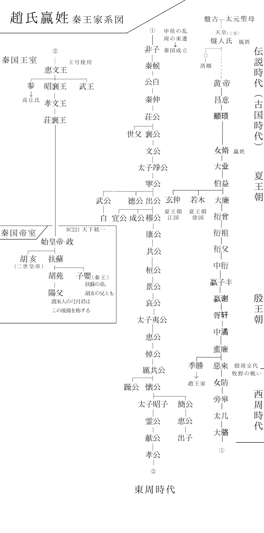 中国語版wikipediaより本画像作成者が作成した長宗我部家·家系図.jpgよりトリミングし、改変。